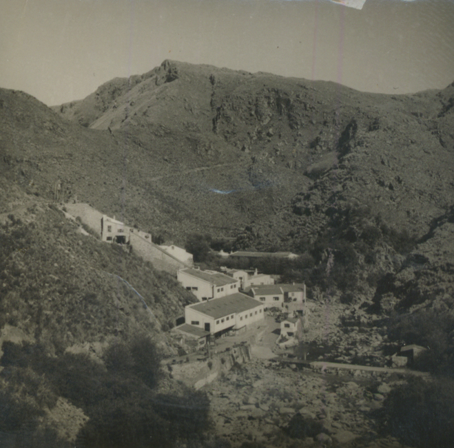 Mina de Cerro Aspero 1960 en plena producción